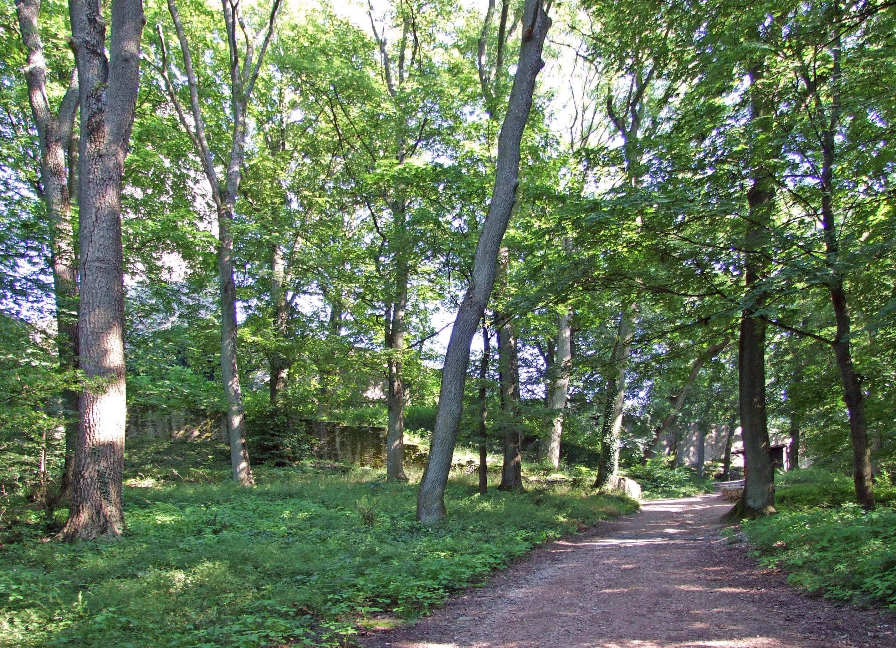 Weg zur Burgruine Falkensteinstein